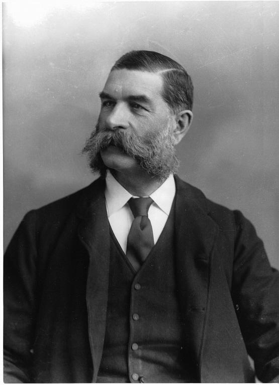 William Watson Ogilvie en 1888. William Watson Ogilvie (Montréal, 15 février 1835 - Montréal, 12 janvier 1900) était un homme d'affaires québécois. Il fut un des pionniers du développement du commerce des céréales au Canada. This image is available from the McCord Museum under the access number II-87527 This tag does not indicate the copyright status of the attached work. A normal copyright tag is still required. See Commons:Licensing for more information. Photo de William Watson Ogilvie. Musée McCord, Montréal, II-87527. Photo : William Notman & Son